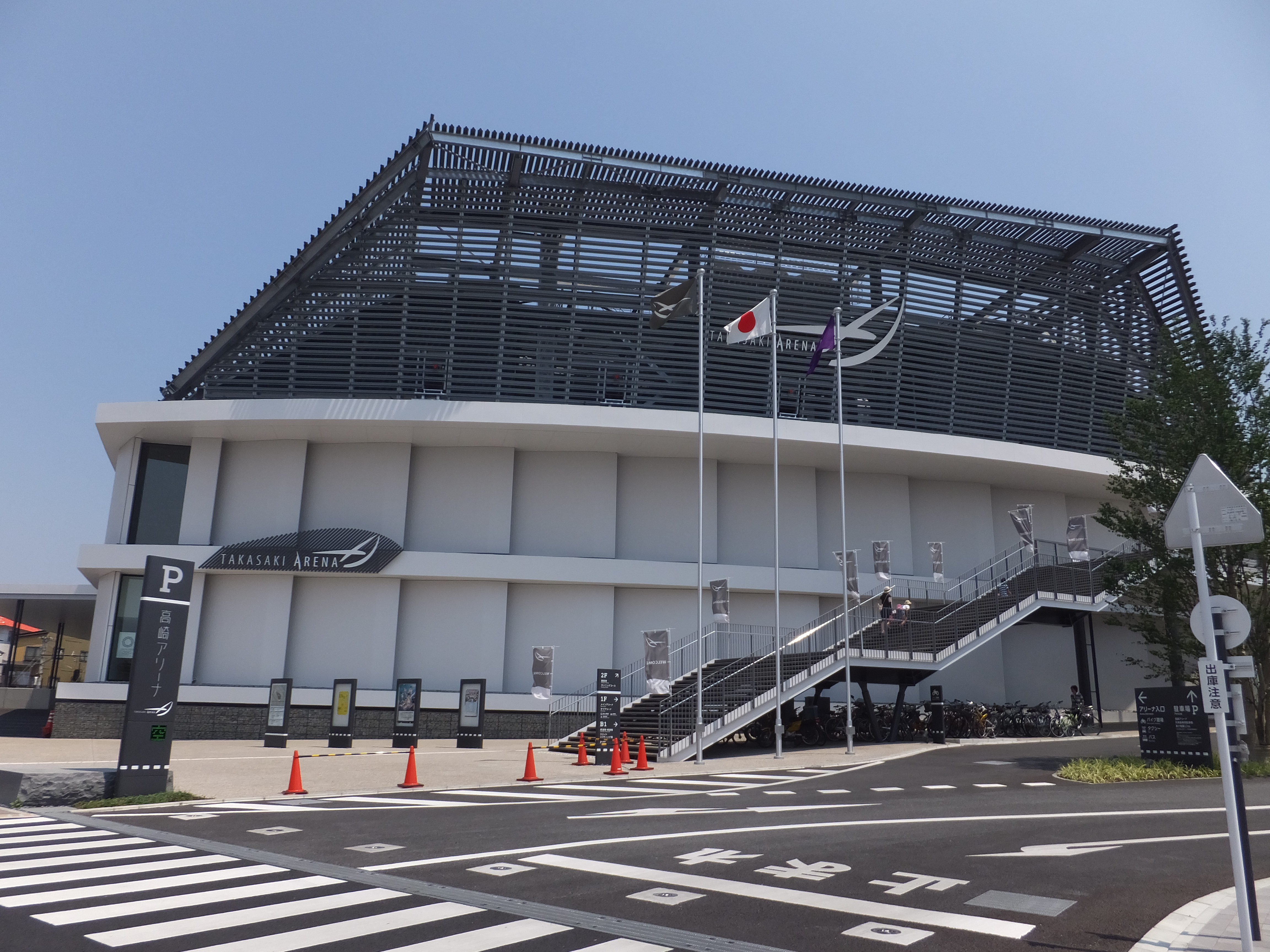 高崎アリーナ外観 南側。 2017年7月撮影。